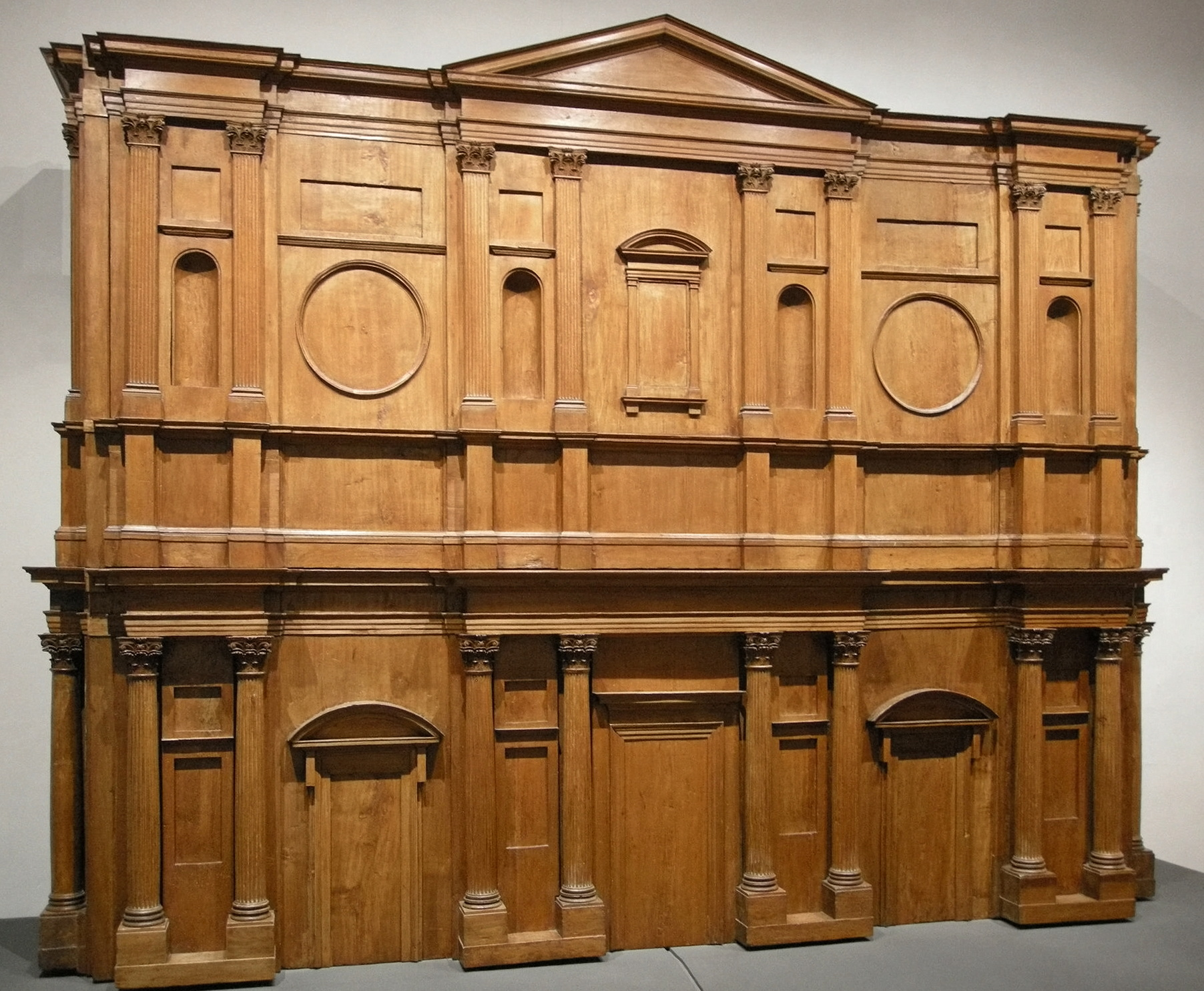 Michelangelo, modello per la facciata di san lorenzo, 1518 ca.